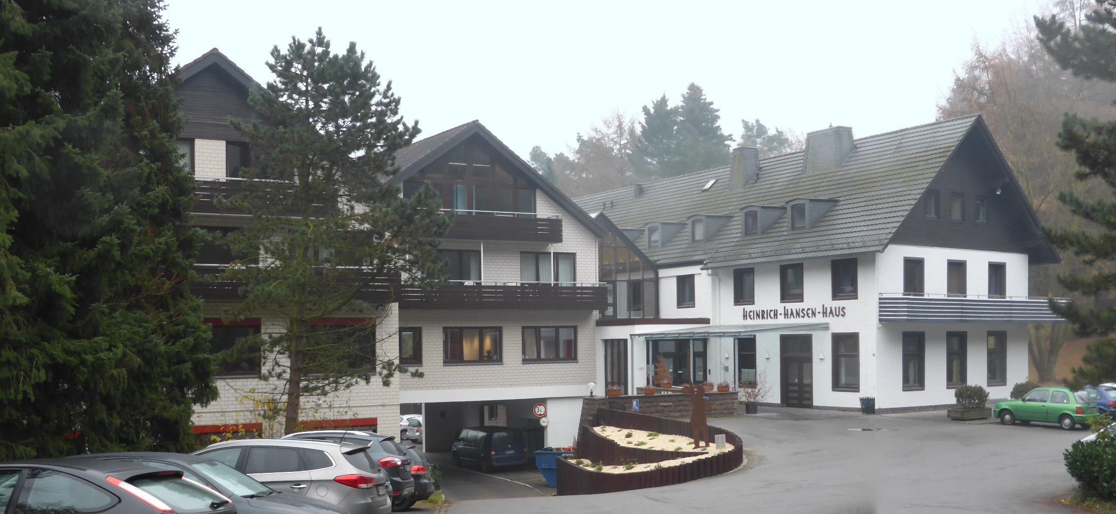 Heinrich-Hansen-Haus, Institut für Bildung, Medien und Kunst.